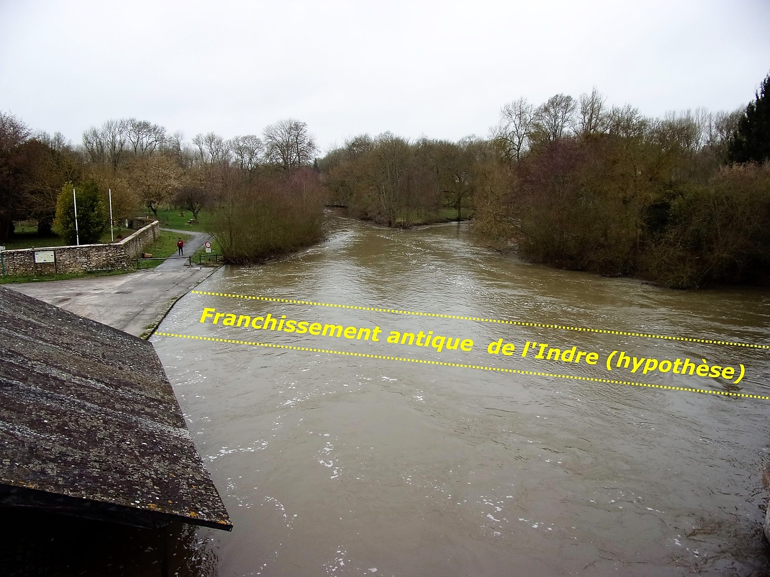 Hypothèse d'emplacement du franchissement antique de l'Indre à Cormery (gué ou pont).